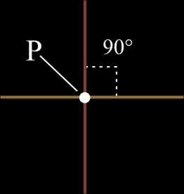 Interlingua: Le angulo recte es formate quando le spatios formate per le intersection de duo lineas recte es equal. Nota que le puncto P es formate per le intersection de duo lineas recte, e es le vertice del angulo.